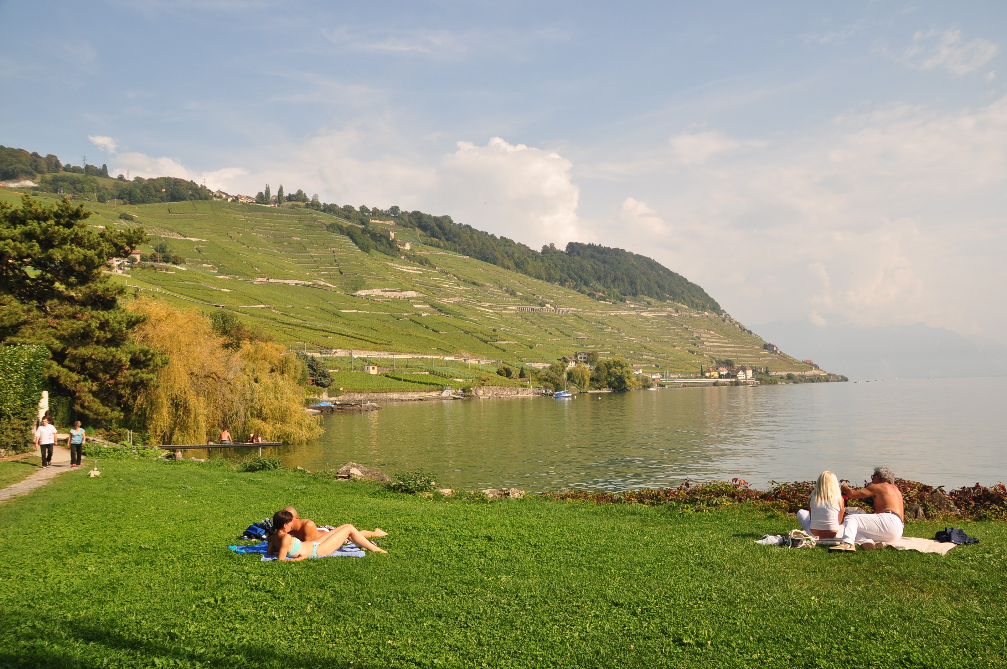 Vignoble de Calamin vu de la plage d'Épesses